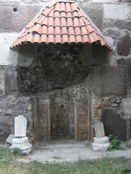 Sultan Alaeddin Cami, Ankara , Türkiye